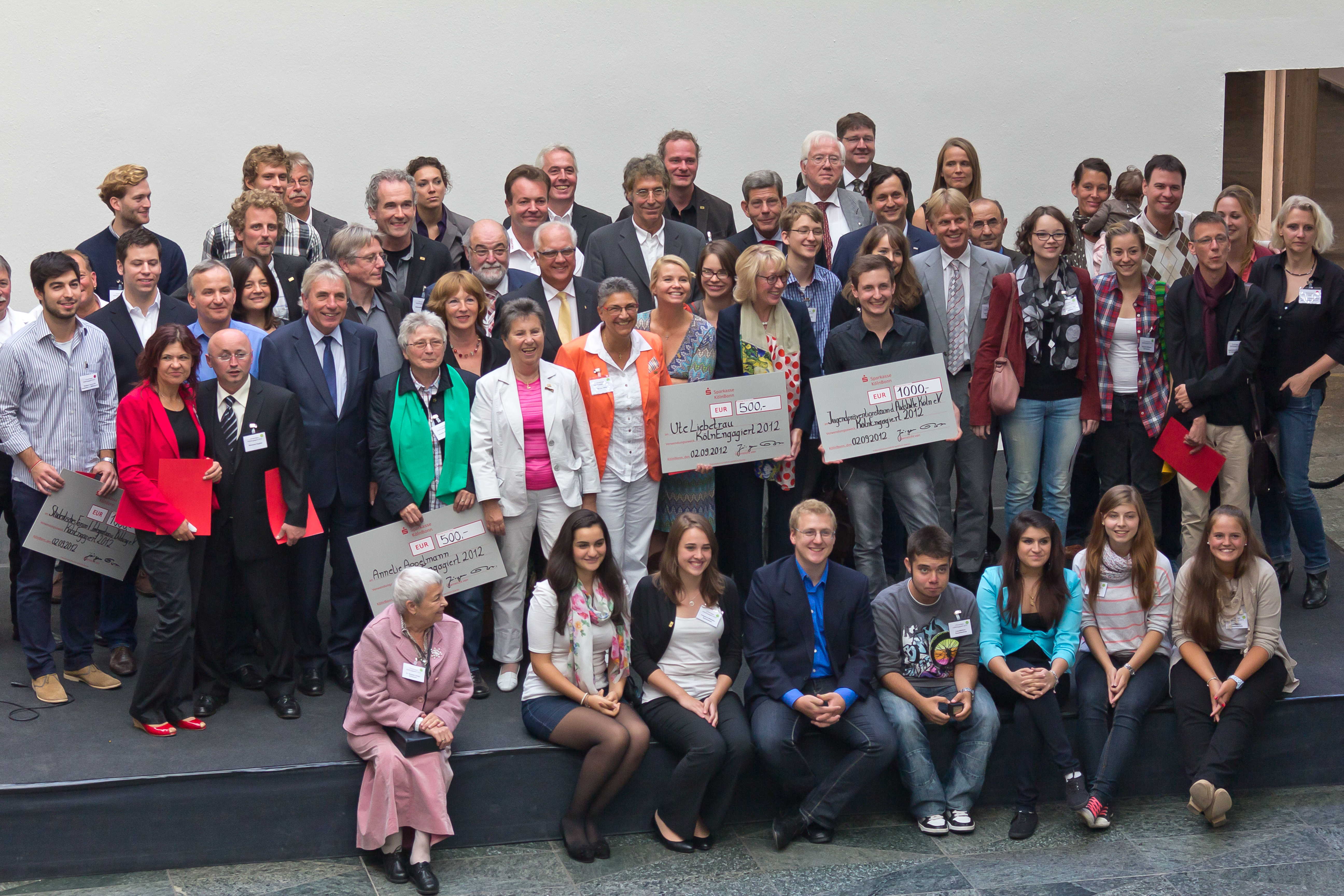 Verleihung der Ehrenamtspreise „KölnEngagiert 2012“ im Historischen Rathaus von Köln Foto: Gruppenfoto in der Piazzetta